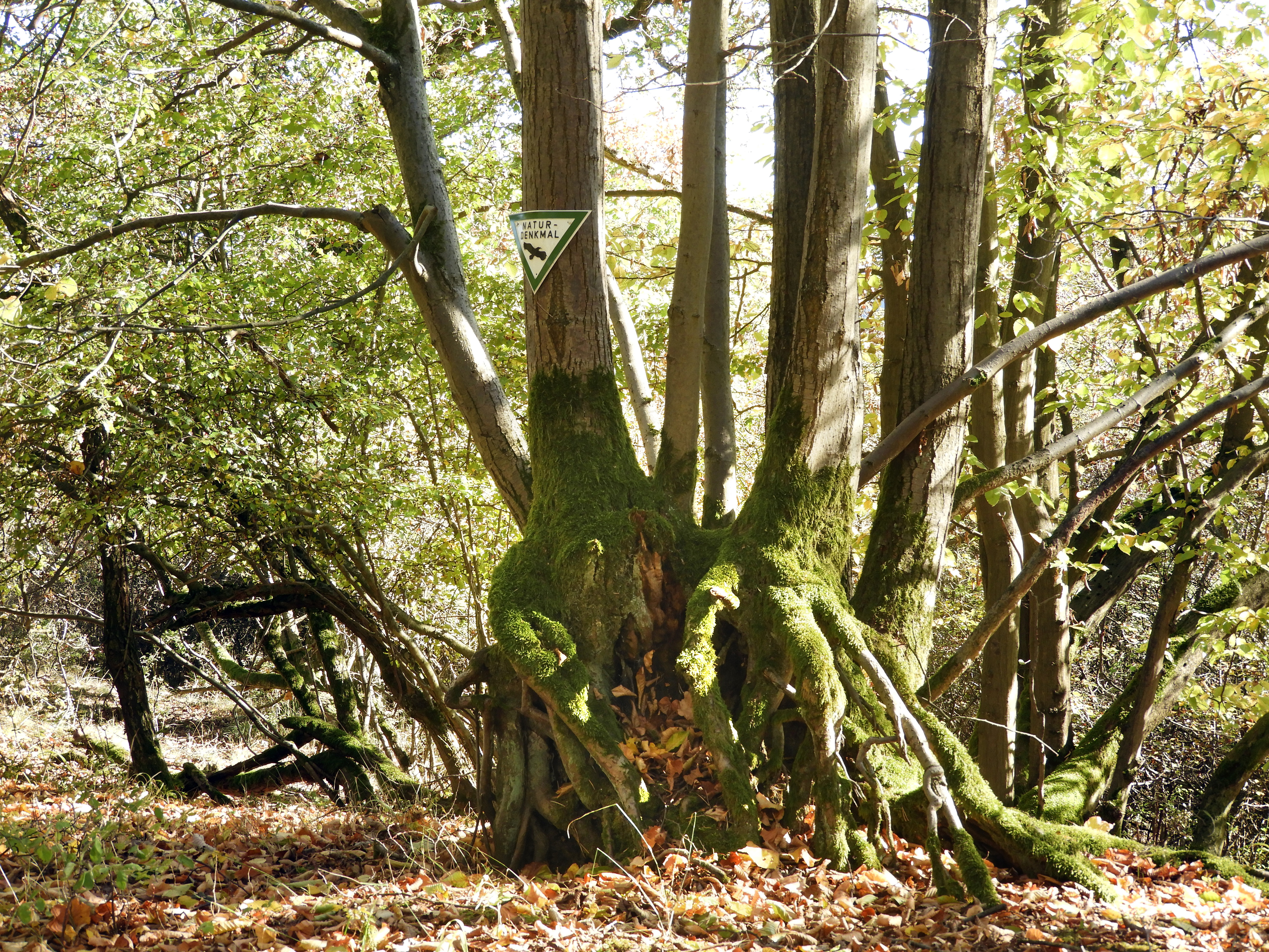 Das Naturschutzgebiet „Feuchtwiesen bei Lüderbach“ liegt zwischen den Ringgauer Ortsteilen Rittmannshausen und Lüderbach im nordhessischen Werra-Meißner-Kreis, nahe der Landesgrenze zu Thüringen. Nordöstlich wird es von der Bundesstraße B 7 begrenzt. Geschützt werden der Feuchtbereich in der Tallage und die trockenen Waldbereiche am Weinberg. Der Bereich wurde in 1995 mit der nationalen Nummer 636027 und dem WDPA-ID-Code 163082 mit einer Fläche von 40,97 Hektar als Naturschutzgebiet ausgewiesen. Das Naturschutzgebiet wurde in 2008 in das insgesamt 185,04 Hektar große Fauna-Flora-Habitat-Gebiet 4926-304 „Wald südöstlich von Netra“ integriert.